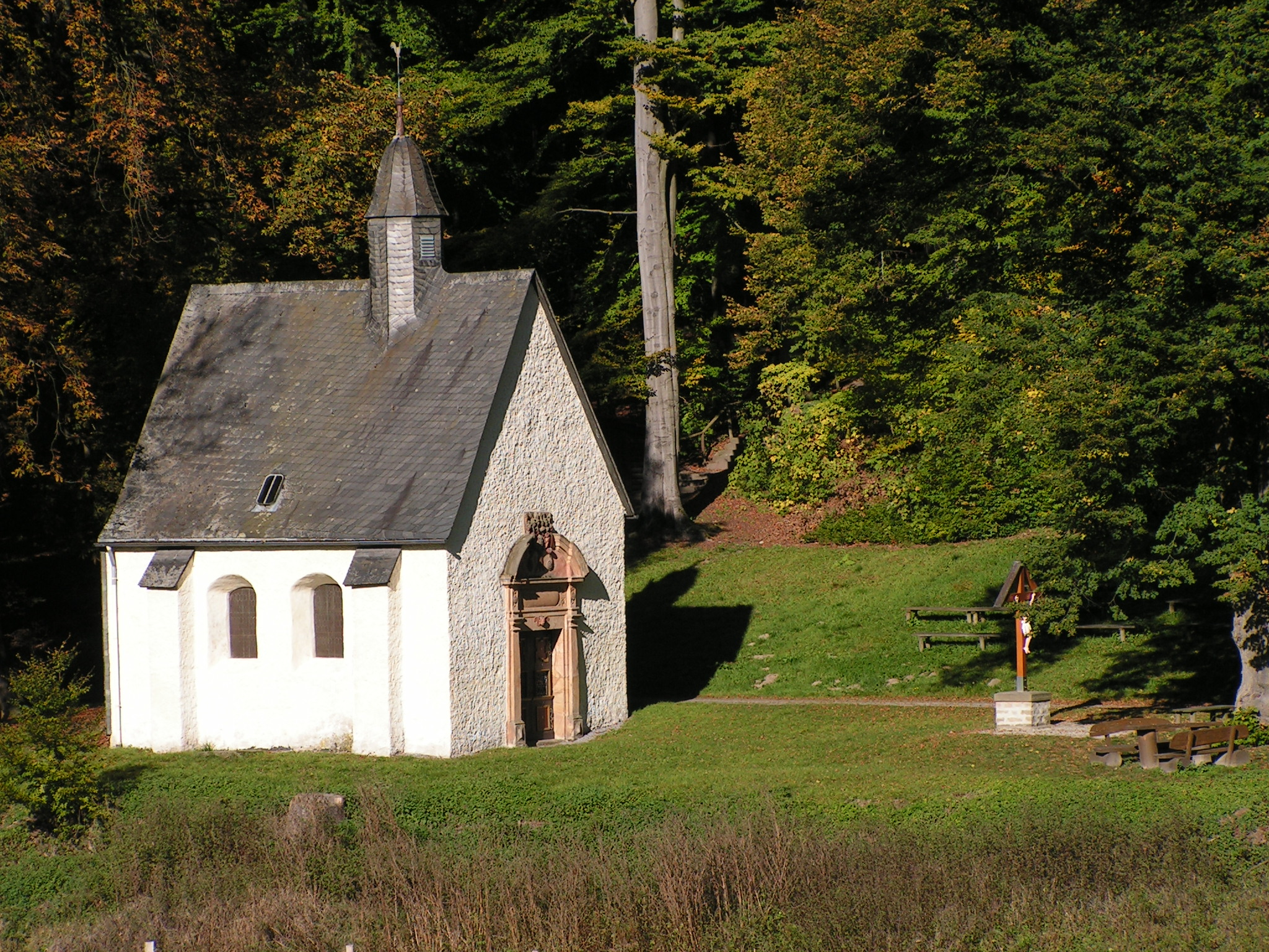 Pfarrei St. Kilian Lichtenau i.W.: Filialkapelle St. Anna in Amerungen